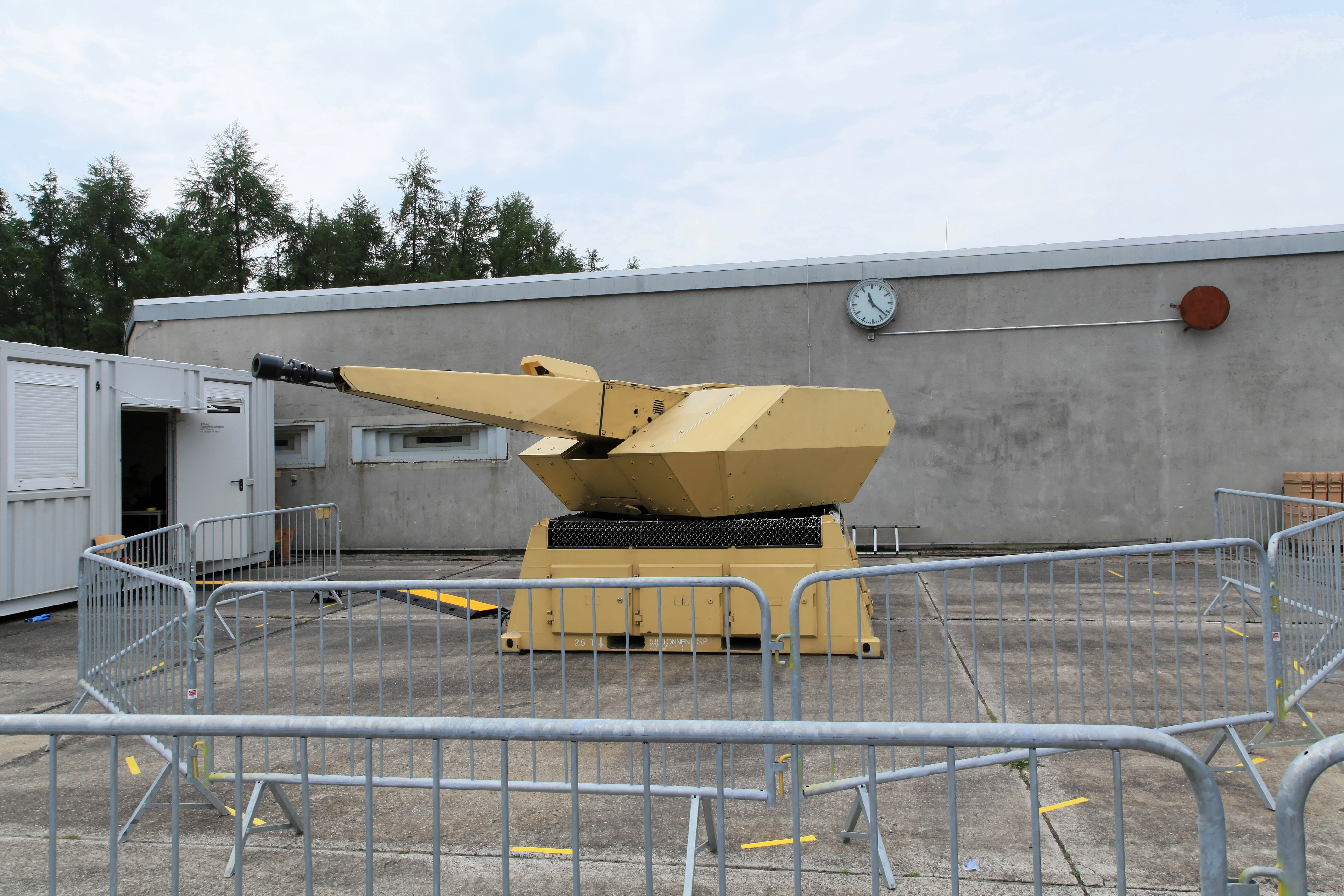 MANTIS (Flugabwehrsystem), Tag der Bundeswehr 2018 bei der Wehrtechnischen Dienststelle 91 in Meppen